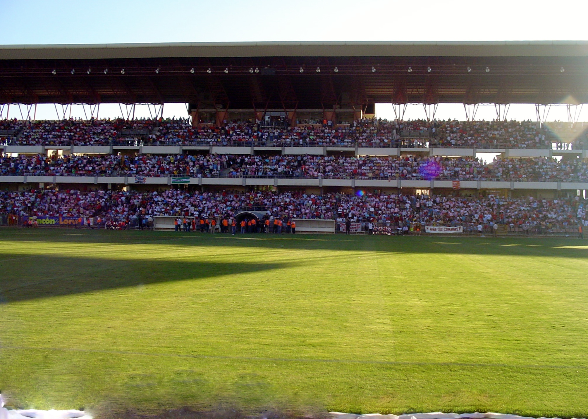 Juan de Dios Ruiz-Cabello González (Granada, 15/03/1985), conocido en los corrillos futbolísticos granadinos como Juande Ruiz. Socio del Granada C.F. desde muy niño, comenzó su andadura en el mundo informativo como subdirector de “Voz Deportiva”, popular programa radiofónico de Radio Mayor, emisora local del colegio La Inmaculada Hermanos Maristas. Tras culminar sus estudios de Gestión Comercial y Marketing, Juande Ruiz entra como redactor en el portal deportivo para la temporada 2008/2009. Aunque su estilo fresco y directo no pasó desapercibido por nadie, fueron sus feroces artículos de opinión los que hicieron que su nombre estuviera en boca de todos. “Los Dioses del Foro”, crítica mordaz hacia algunos asiduos al Foro de los Aficionados del Granada C.F., hicieron temblar los cimientos de este concurrido lugar de encuentro para la hinchada rojiblanca. Su trabajó y dedicación le puso en la órbita del Granada C.F. para su Departamento de Prensa en Febrero del presente año. El pasado 1 de Marzo, este joven granadino vio cumplido uno de sus sueños, al convertirse en Adjunto en el Área de Comunicación y Prensa de la histórica entidad. Pese a los enormes y favorables cambios vividos por el Club de la ciudad de la Alhambra en los últimos meses, Juande Ruiz continúa trabajando y esforzándose porque la actualidad rojiblanca llegue día tras día a todos los interesados. Motivos laborales provocan que Manuel Albendín abandone la jefatura del Gabinete de Prensa el pasado 18 de Febrero de 2010, haciéndose Juande Ruiz con las riendas de la parcela a sus tan sólo 24 años de edad.